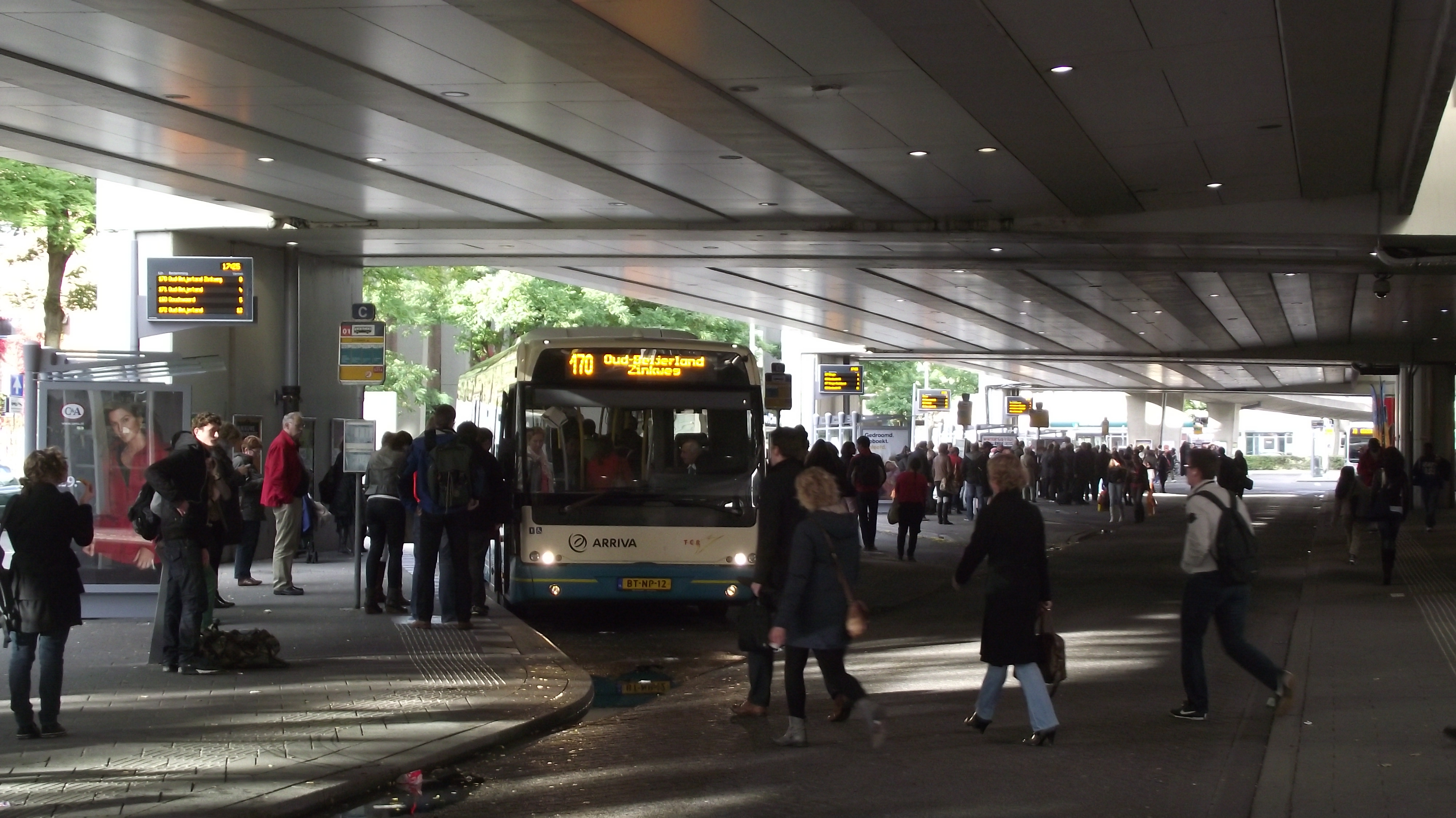 Arriva buslijn 170 vertrekkend vanaf het busstation Zuidplein